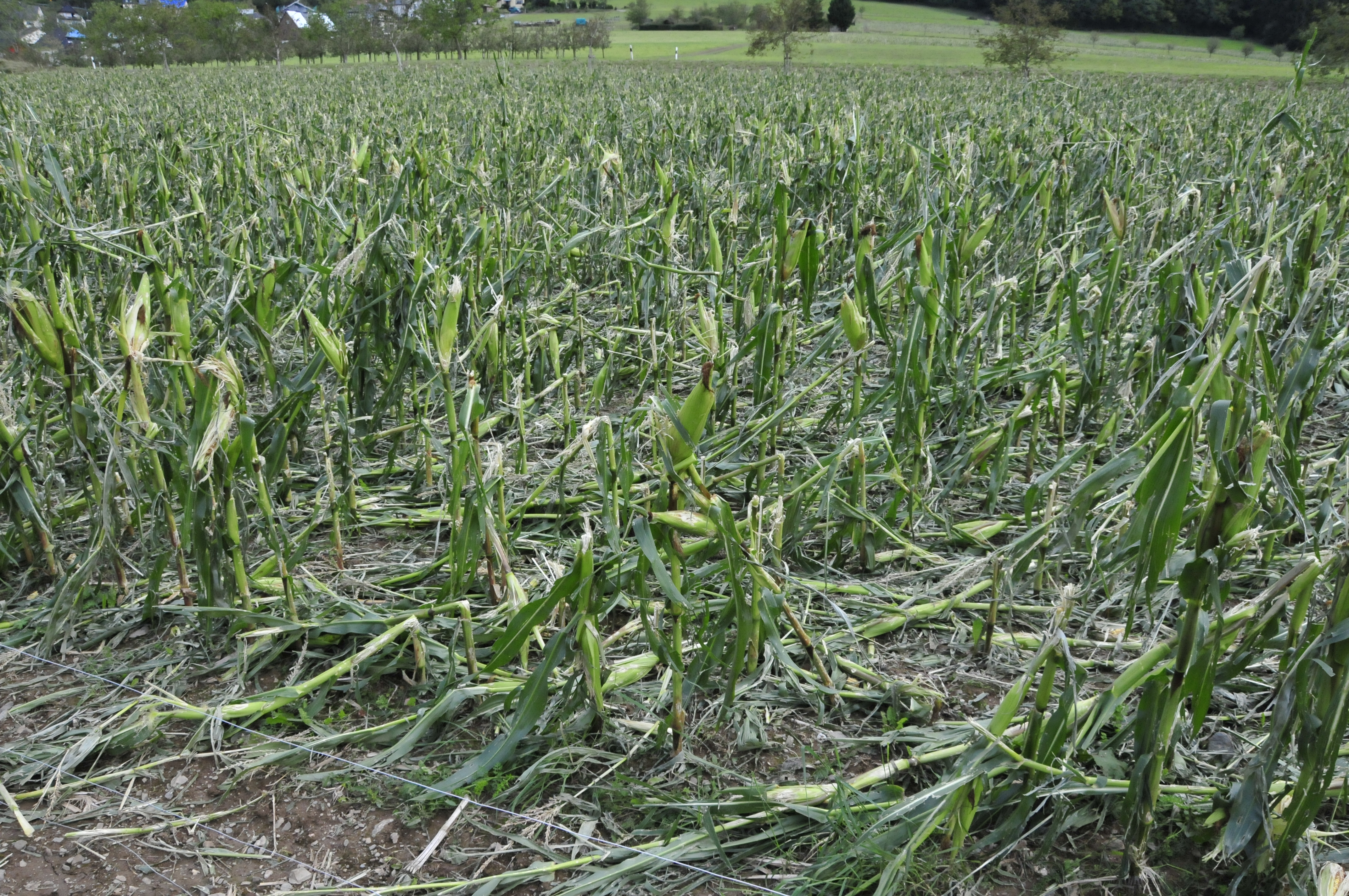 Hagelschäden in einem Maisfeld von Veldenz